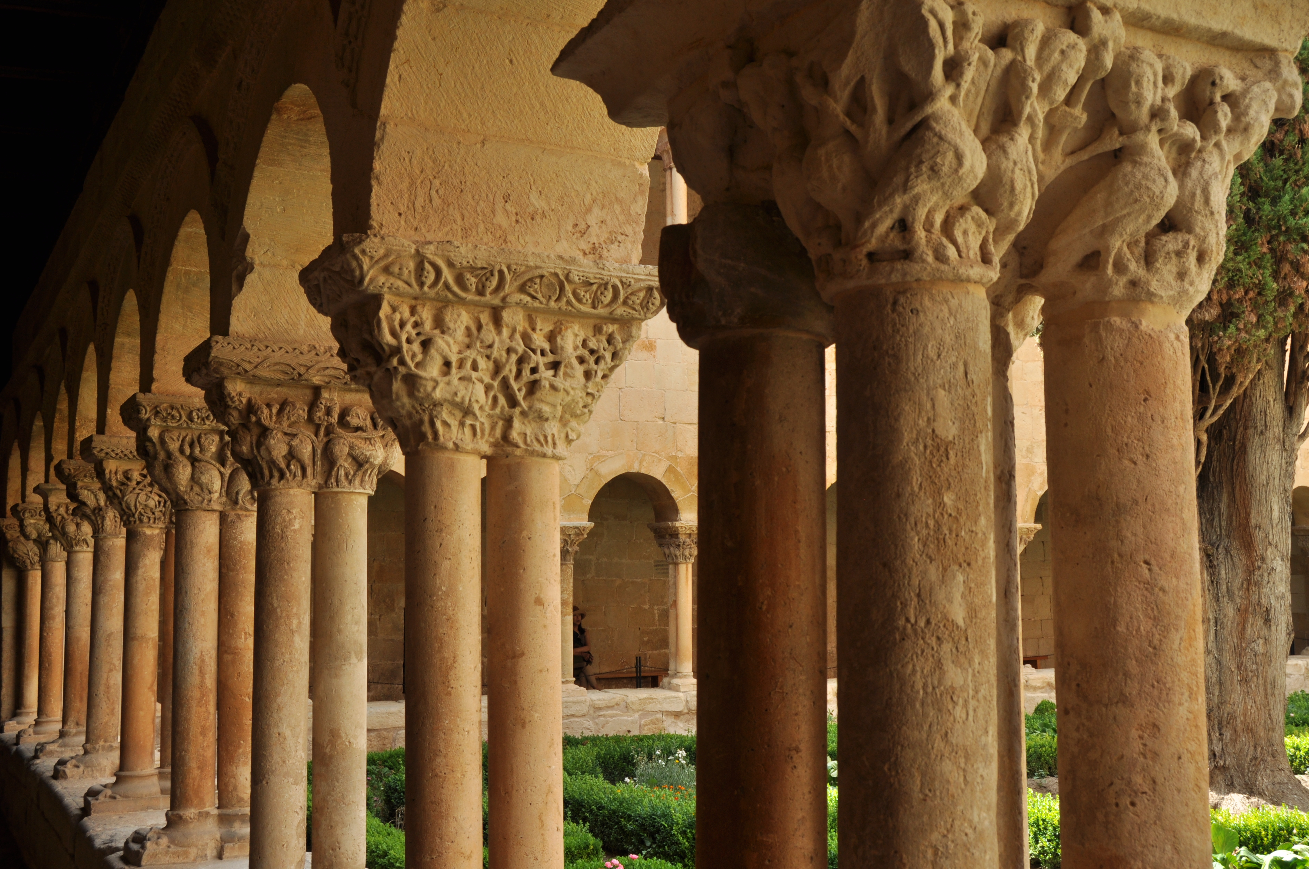 Santo Domingo de Silos - 013